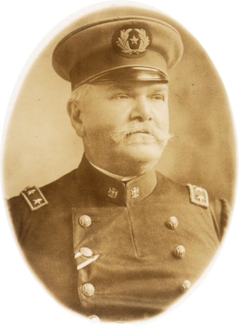 Emil Körner Henze (* Halle an der Saale, Prusia, 1846 - † Berlín, Alemania, 25 de marzo de 1920). Militar Alemán. Heredero de una larga tradición militar prusiana, fue Comandante del Ejército de Chile con el grado de Inspector General desde 1900 a 1910.